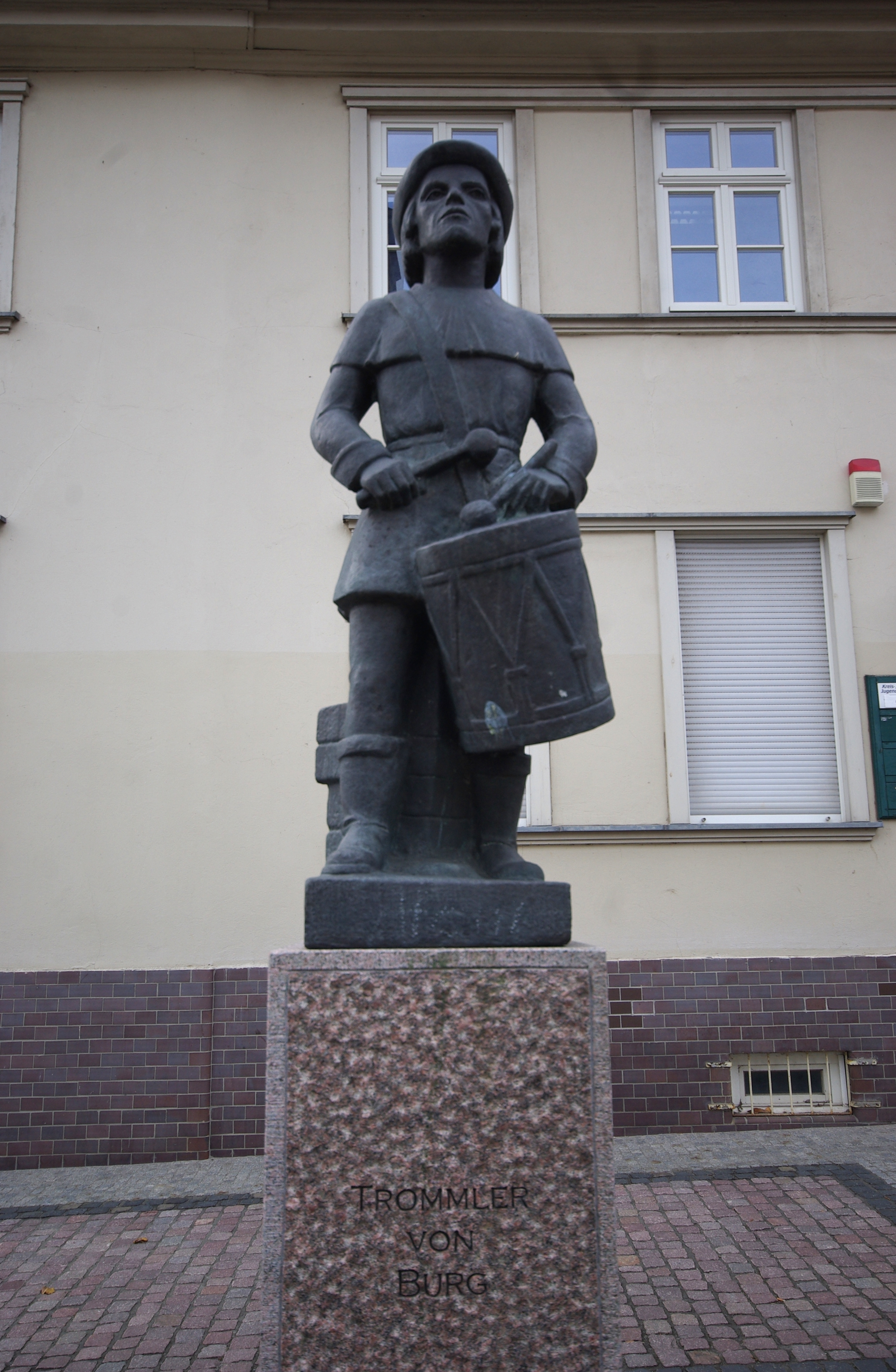 Der Trommler von Burg vor dem kleinen Rathaus gegenüber dem Rathaus